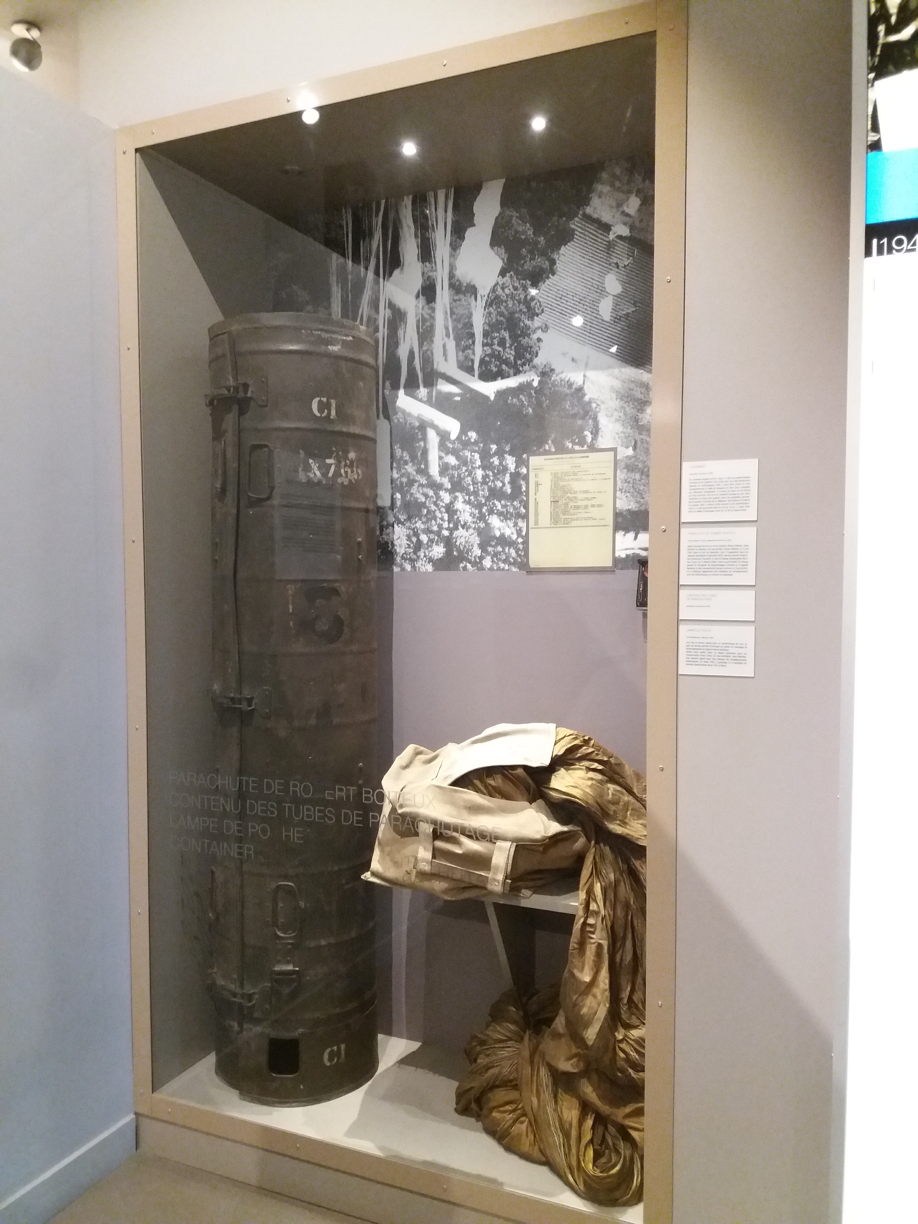 Container anglais de type C pour le parachutage d'armes et matériel, parachuté dans la nuit du 10 au 11 août 1944 dans la vallée d'Azergues, près du col de la Casse froide. Parachute de Robert Boiteux, parachuté à Anse le 2 juin 1942 pour rejoindre Lyon en tant que membre des SOE (Special Operations Executive) ; fonds Gaspard et Picard, association des amis du CHRD.